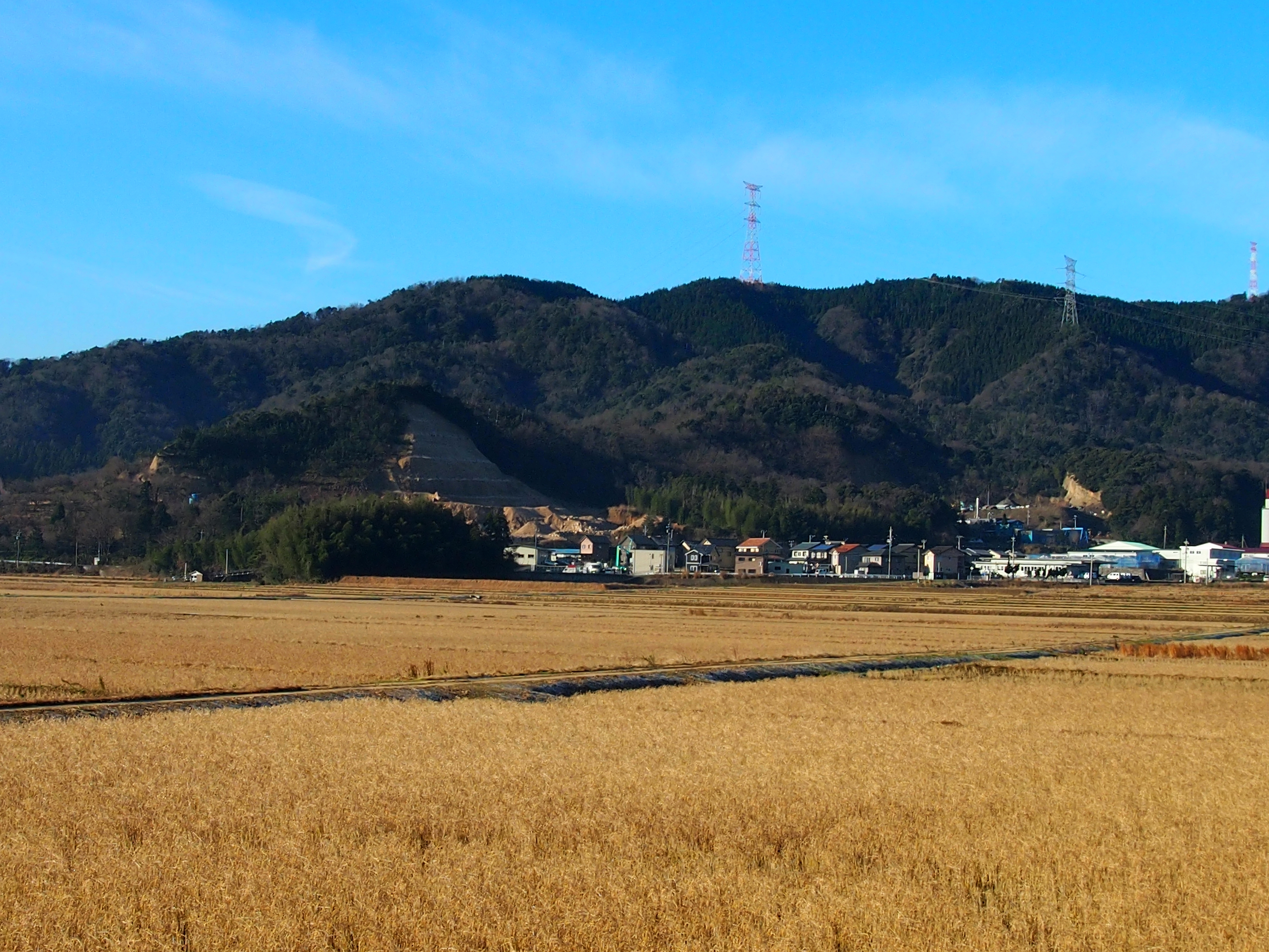 福井県敦賀市と美浜町の境にある旗護山。赤白鉄塔の右横付近のなだらかなピーク。